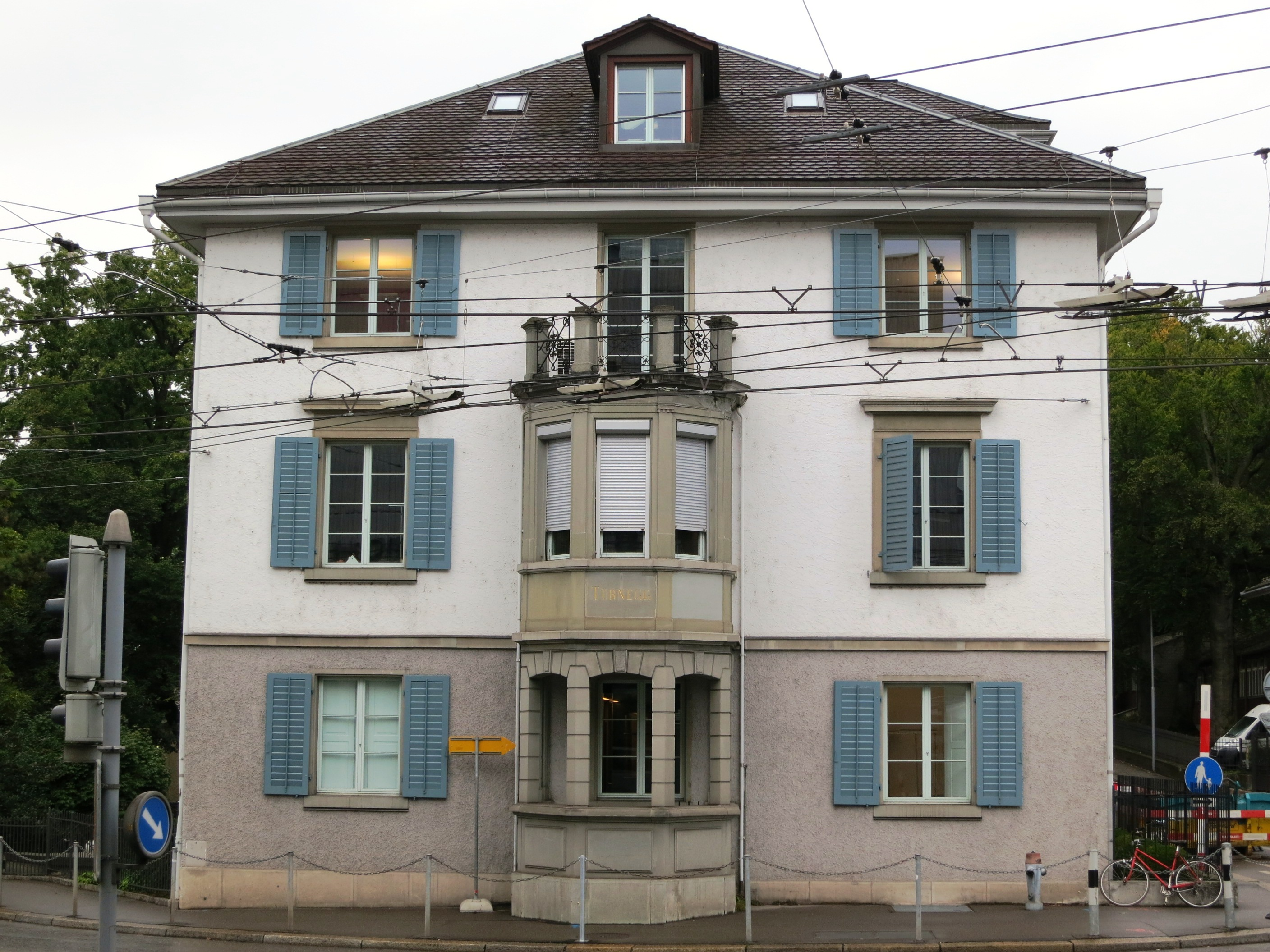 ehem. Heilpädagogisches Seminar Zürich-Fluntern, Schweiz